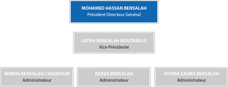 Organigramme du groupe Holmarcom